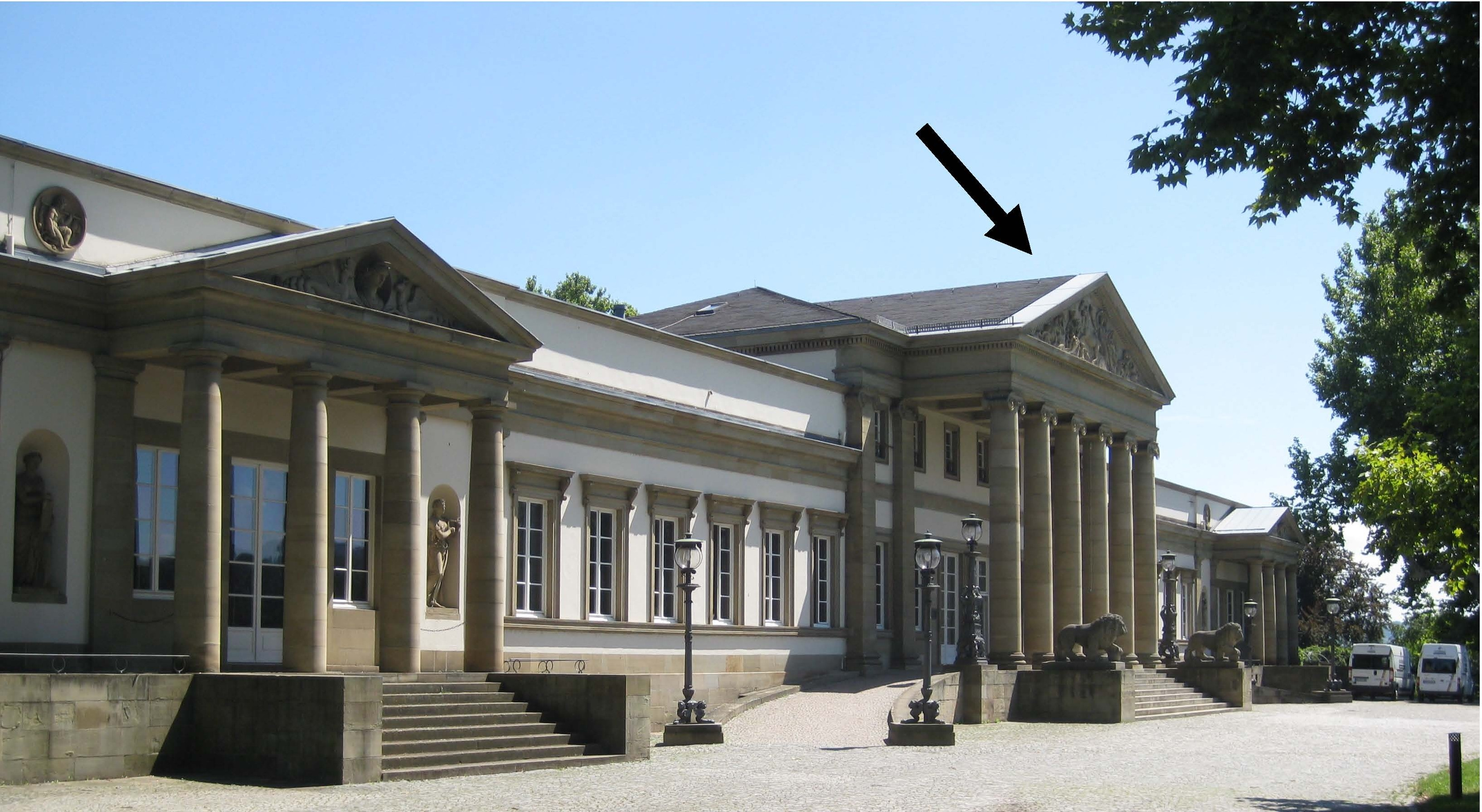 Stuttgart, Schloß Rosenstein, Südwestfassade. Der Pfeil zeigt auf das Giebelfeld des Säulenportikus am Haupteingang.